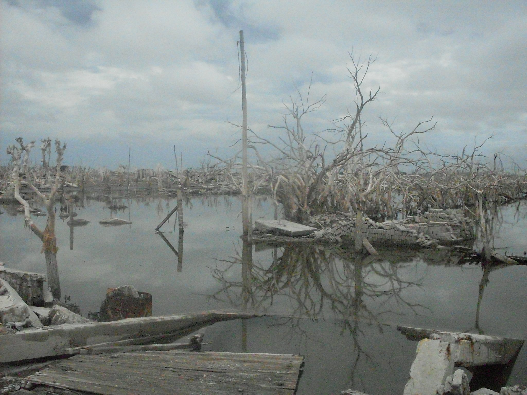 Villa Epecuén, prov de Bs As